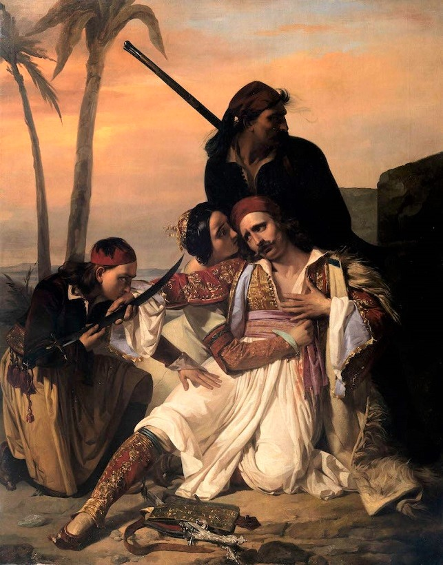 La morte di Lambro Zavella, olio su tela, 220 x 170 cm., datato e firmato, coll. privata